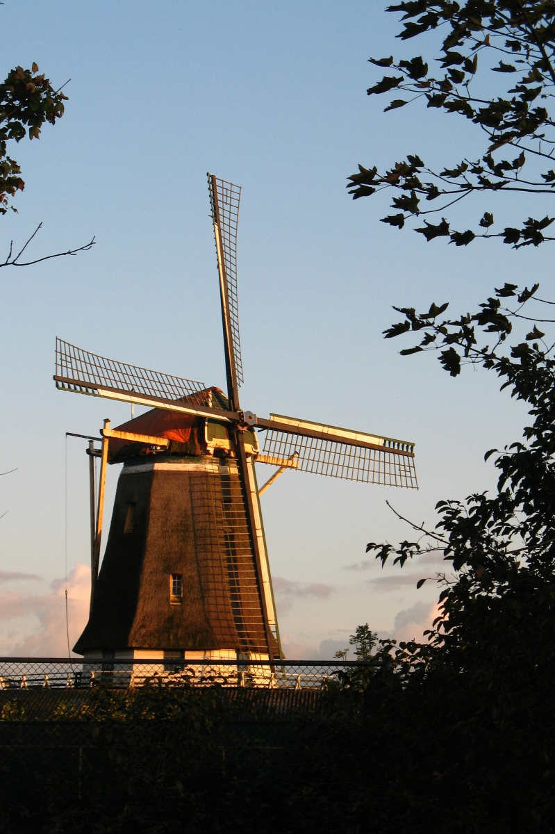 De Kraai, Westbroek, Utrecht, stellingmolen